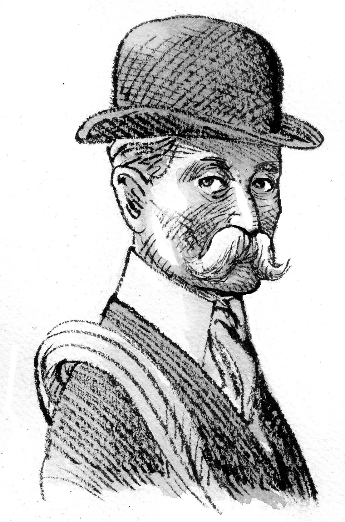 Henri Brulle, pyrénéiste